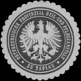 Sealing stamp Title: Ostpreussische Provinzial Heil- und Pflegeanstalt Tapiau Description: schwarz, weiß, geprägt Place: Tapiau size: 4 cm